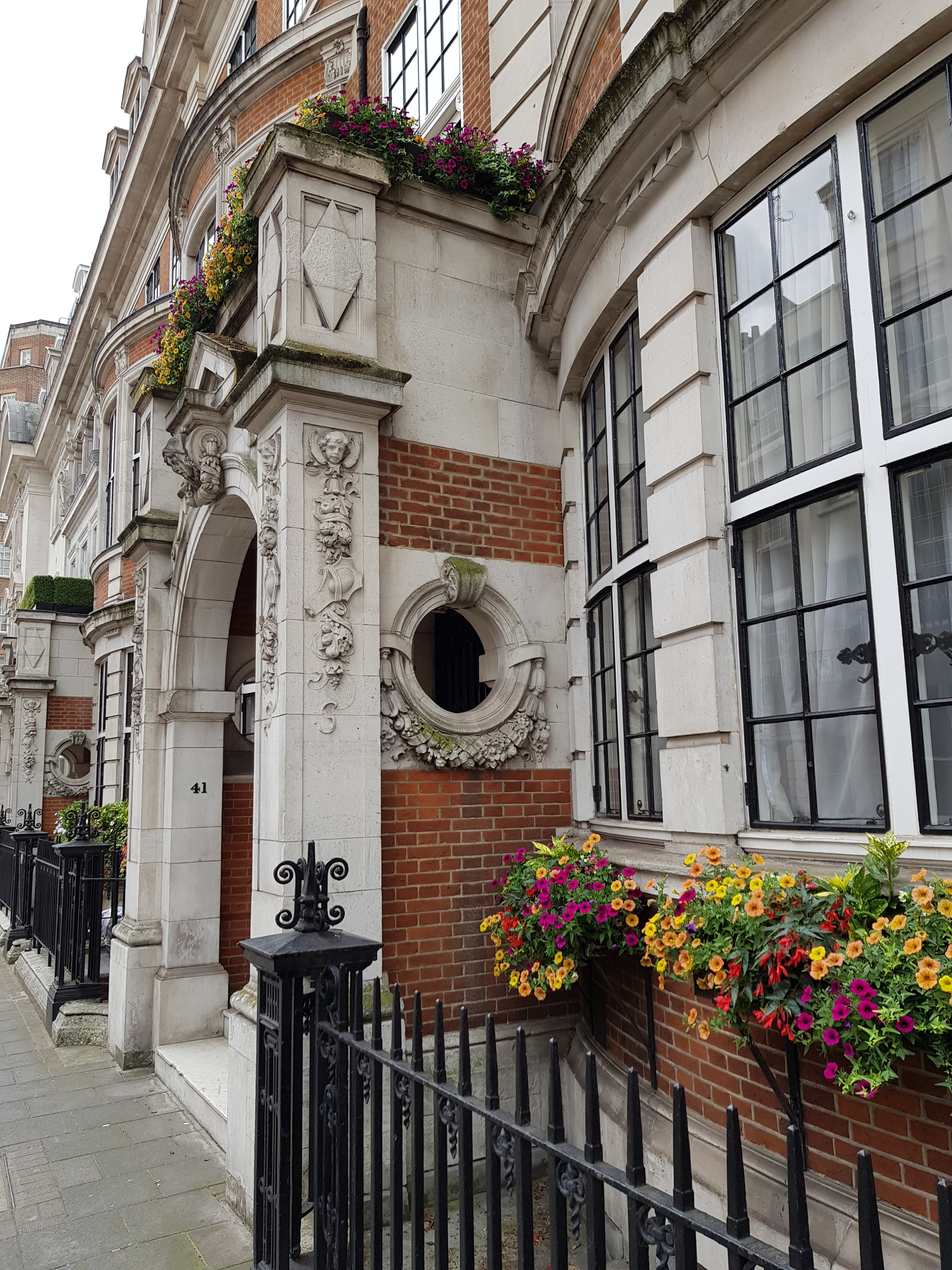 41, Park Street, Londres.